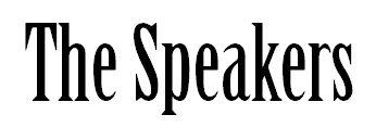 Los Speakers